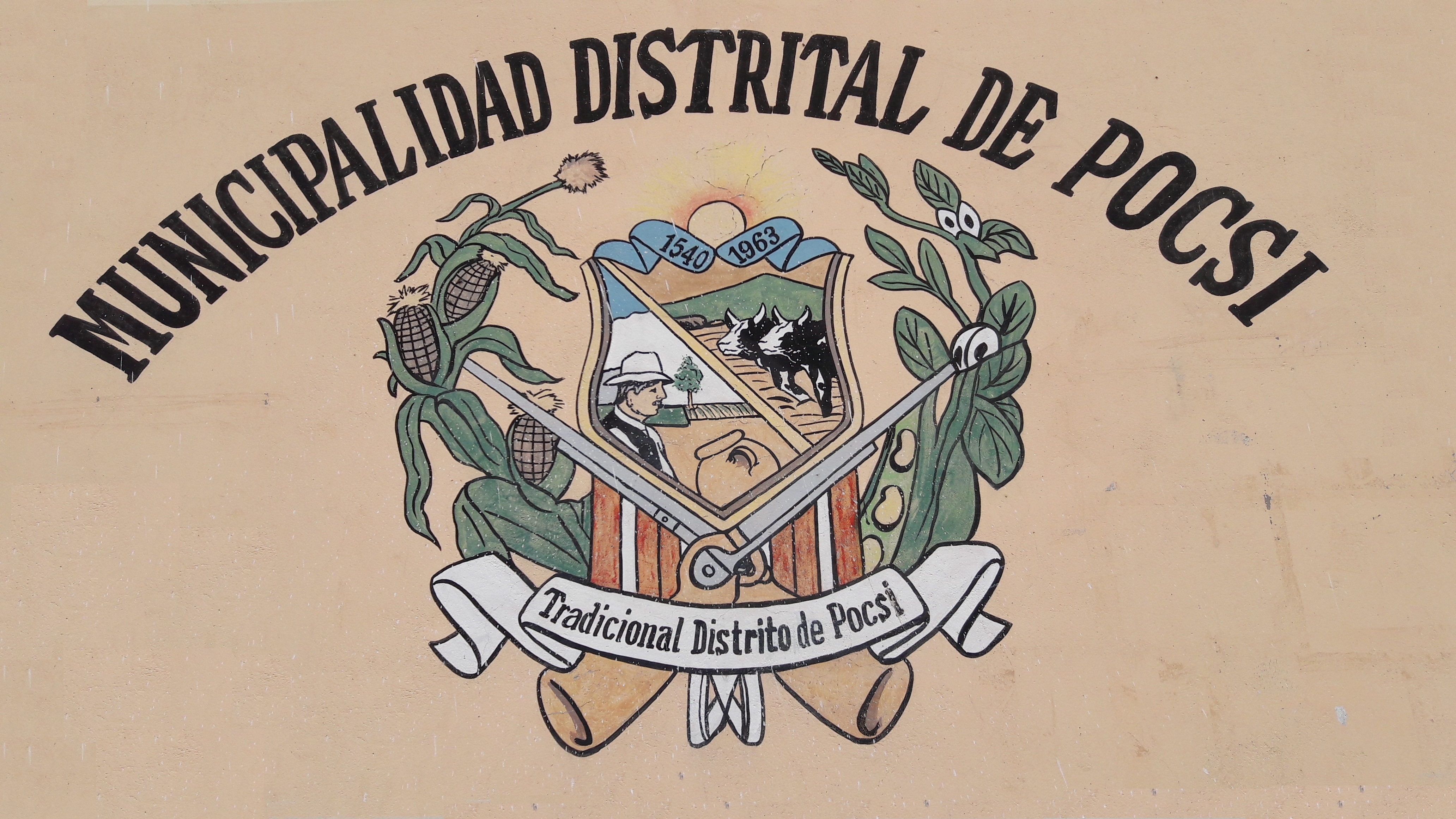 Imagen del escudo del distrito de Pocsi